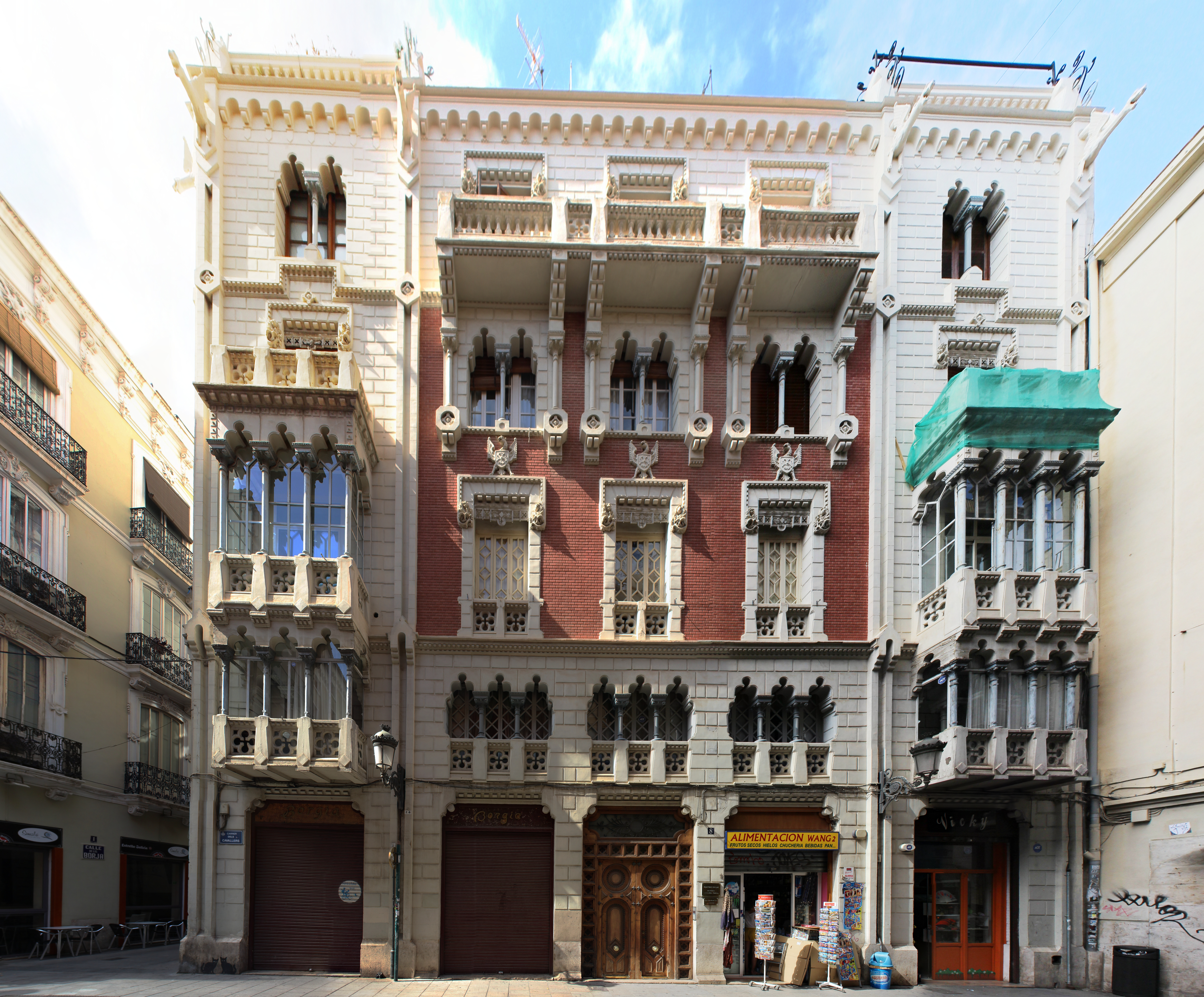 Edificio en la calle Caballeros número 8 en Valencia obra de José María Manuel Cortina Pérez